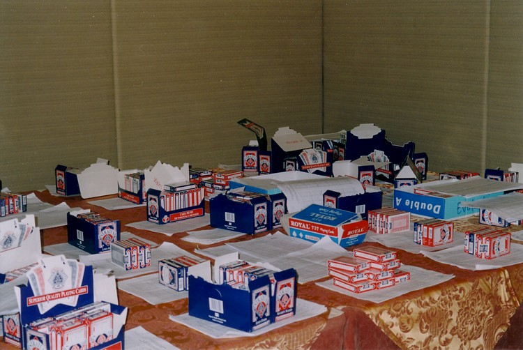 Kartenstapel